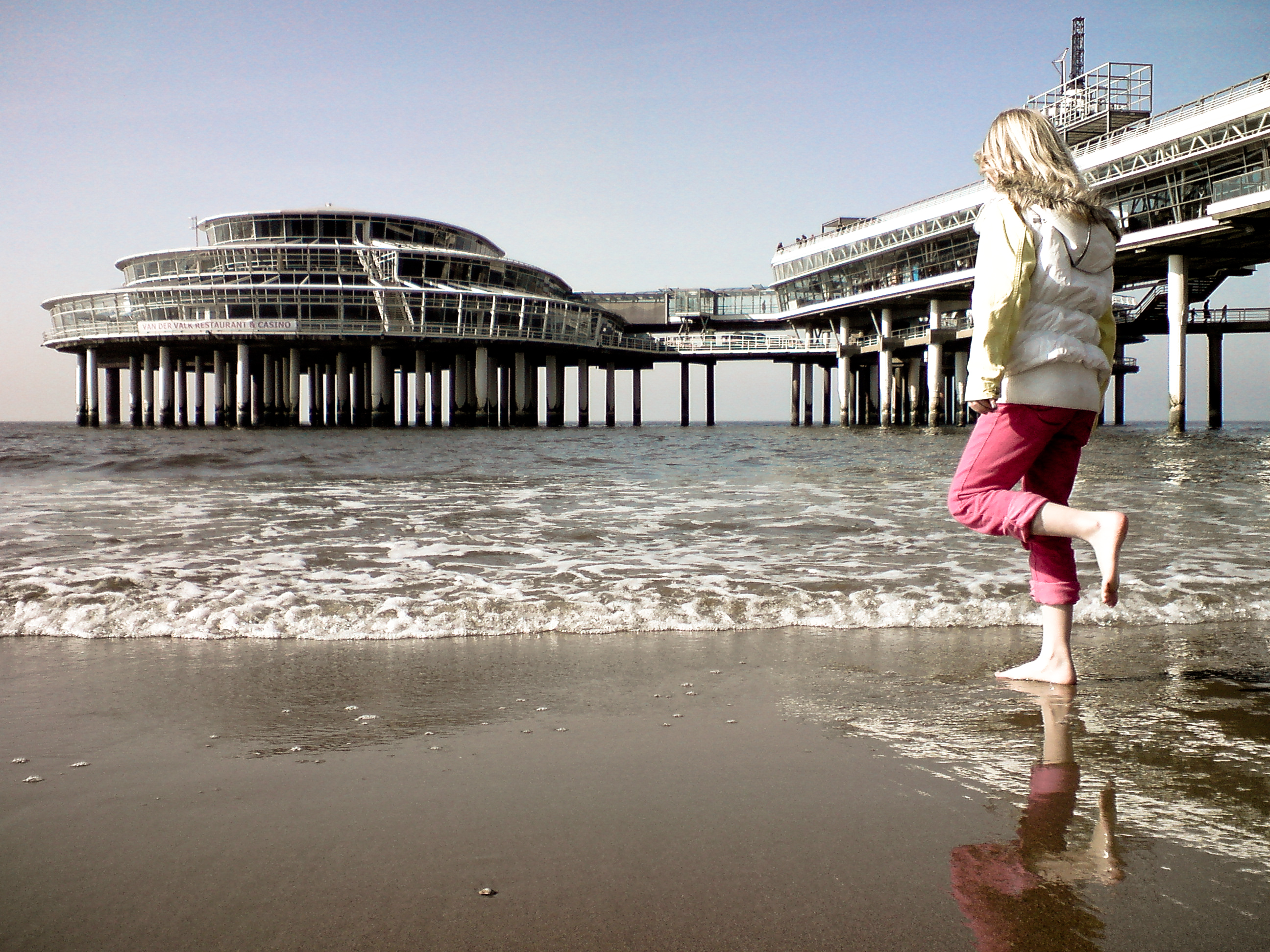 De pier bij Scheveningen